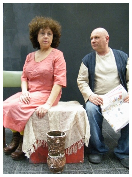 רקוויאם לדניאל מאת ובבימויו של עודד ליפשיץ